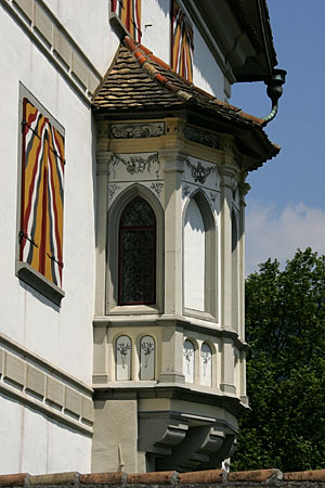 Freulerpalast (1647) in Näfels: Erker an der Südfassade